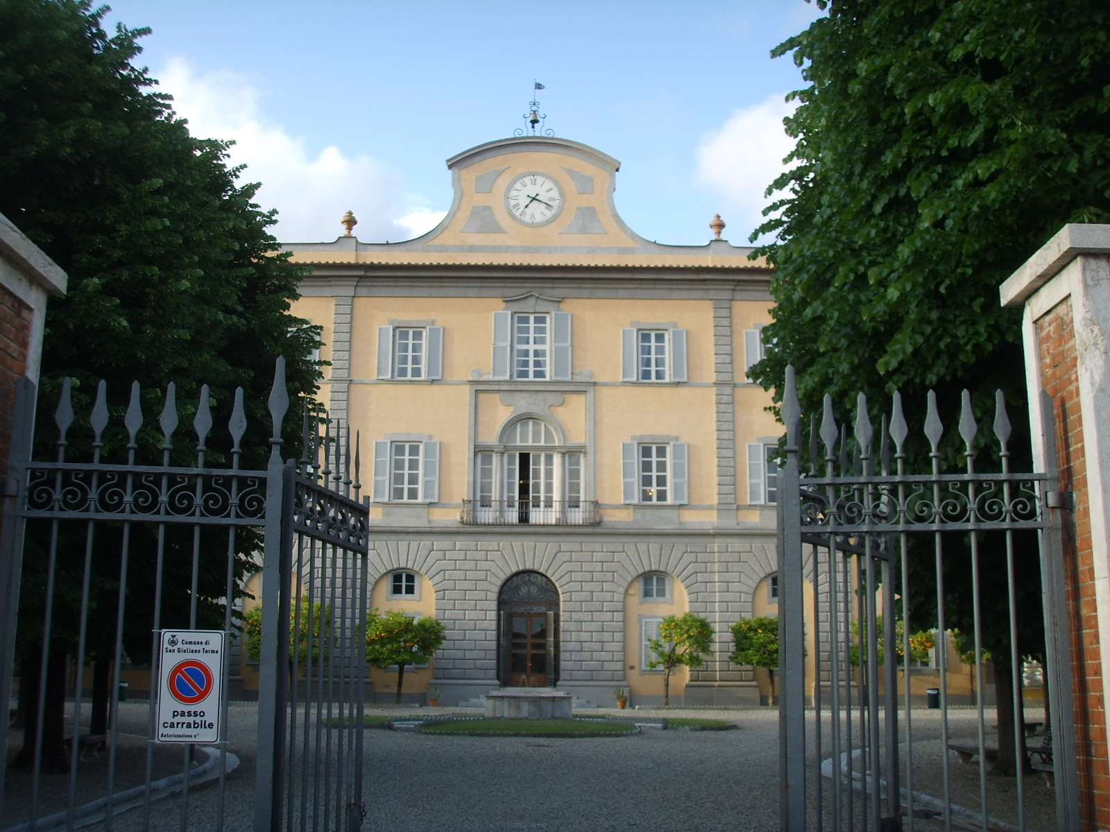 San giuliano terme, terme